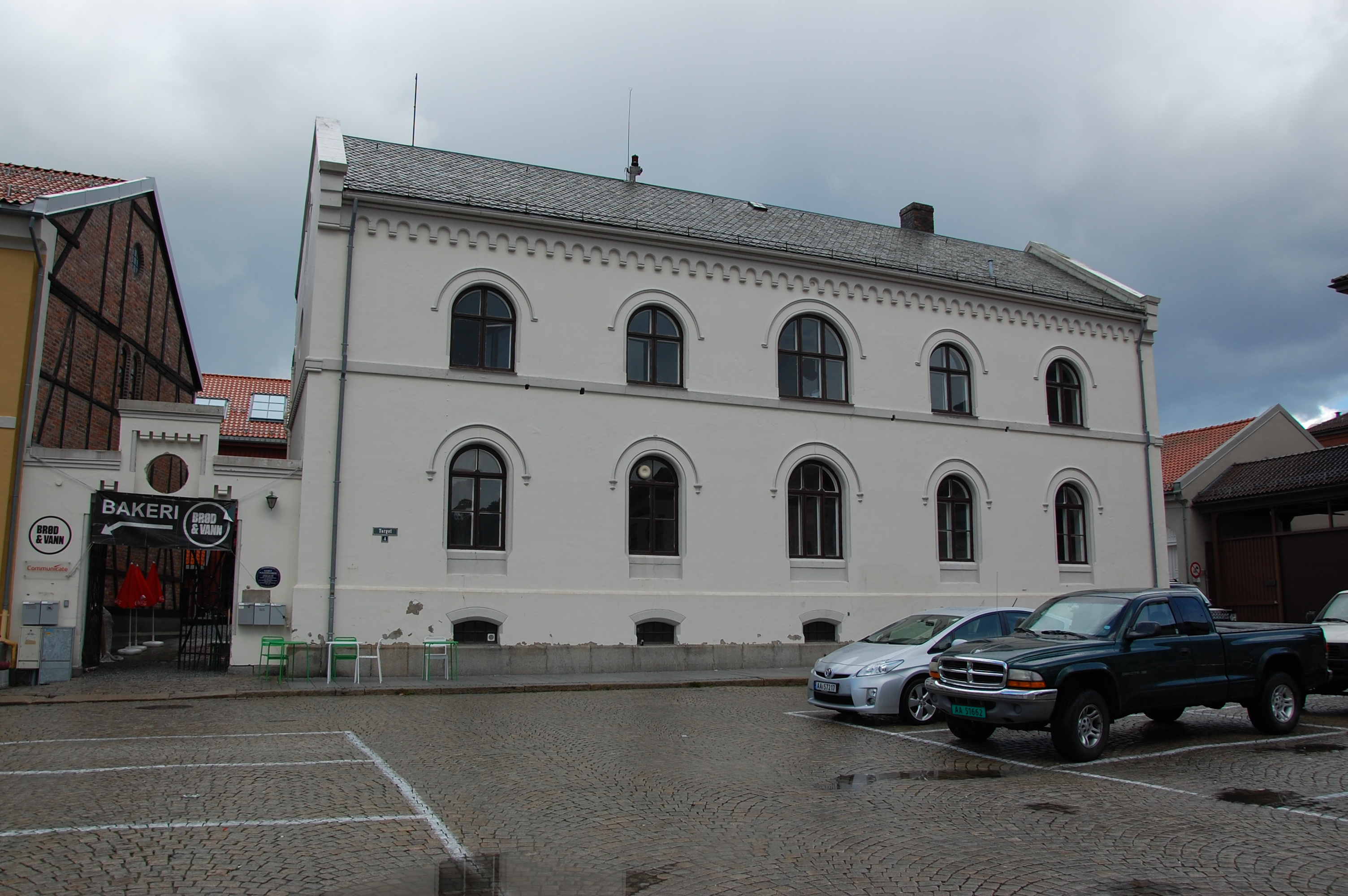 Halden gamle politistasjon og fengsel, Torvet 4, Halden. Arkitekt Gustav Blom Kielland.